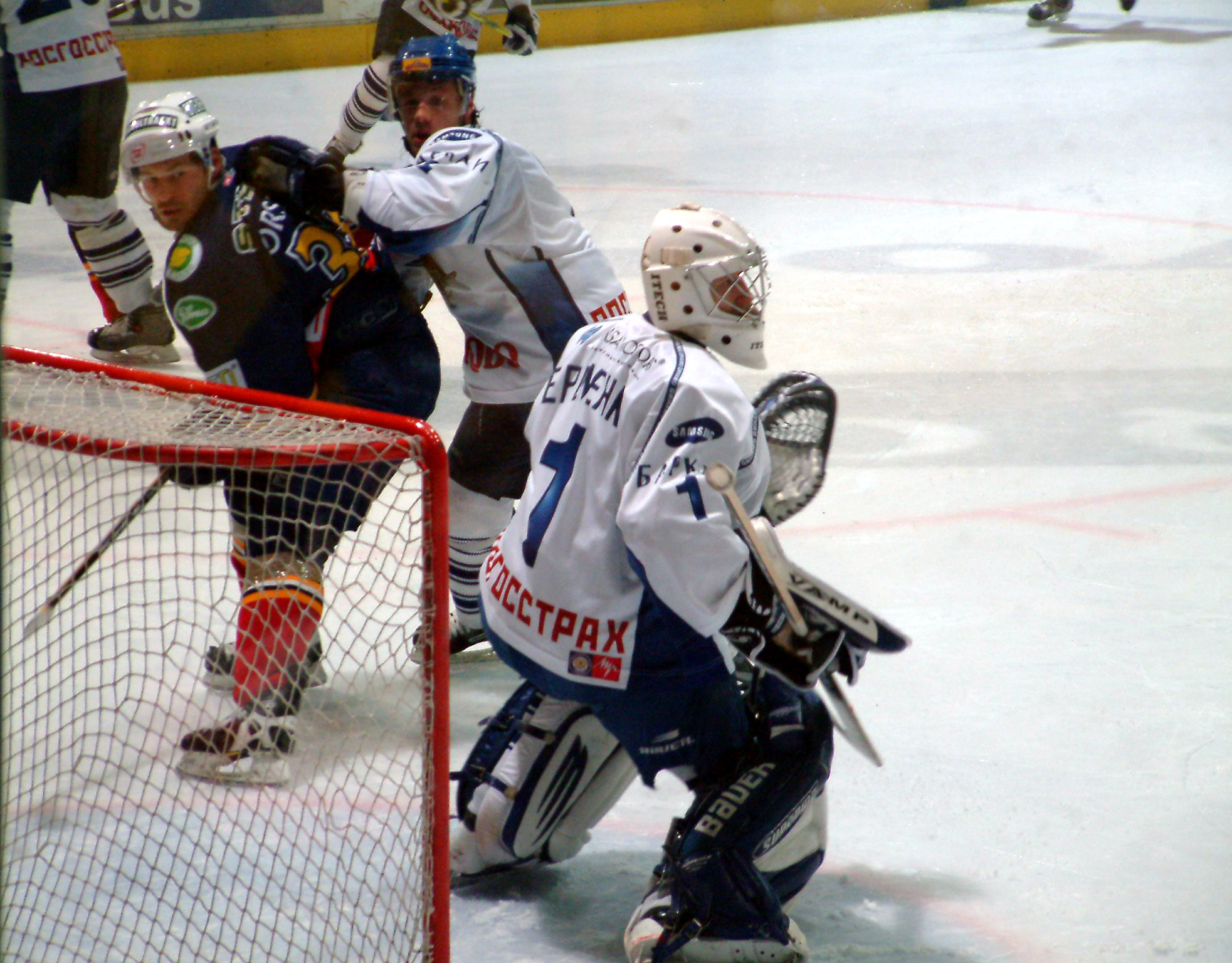 Aleksandr Eremenko, or Aleksander Yeremenko, during IIHF Continental Cup game vs. HKm Zvolen Székesfehérvàr, Continental Cup 2004/05 - Super Final, Dinamo Moscow - HKm Zvolenyeremenko